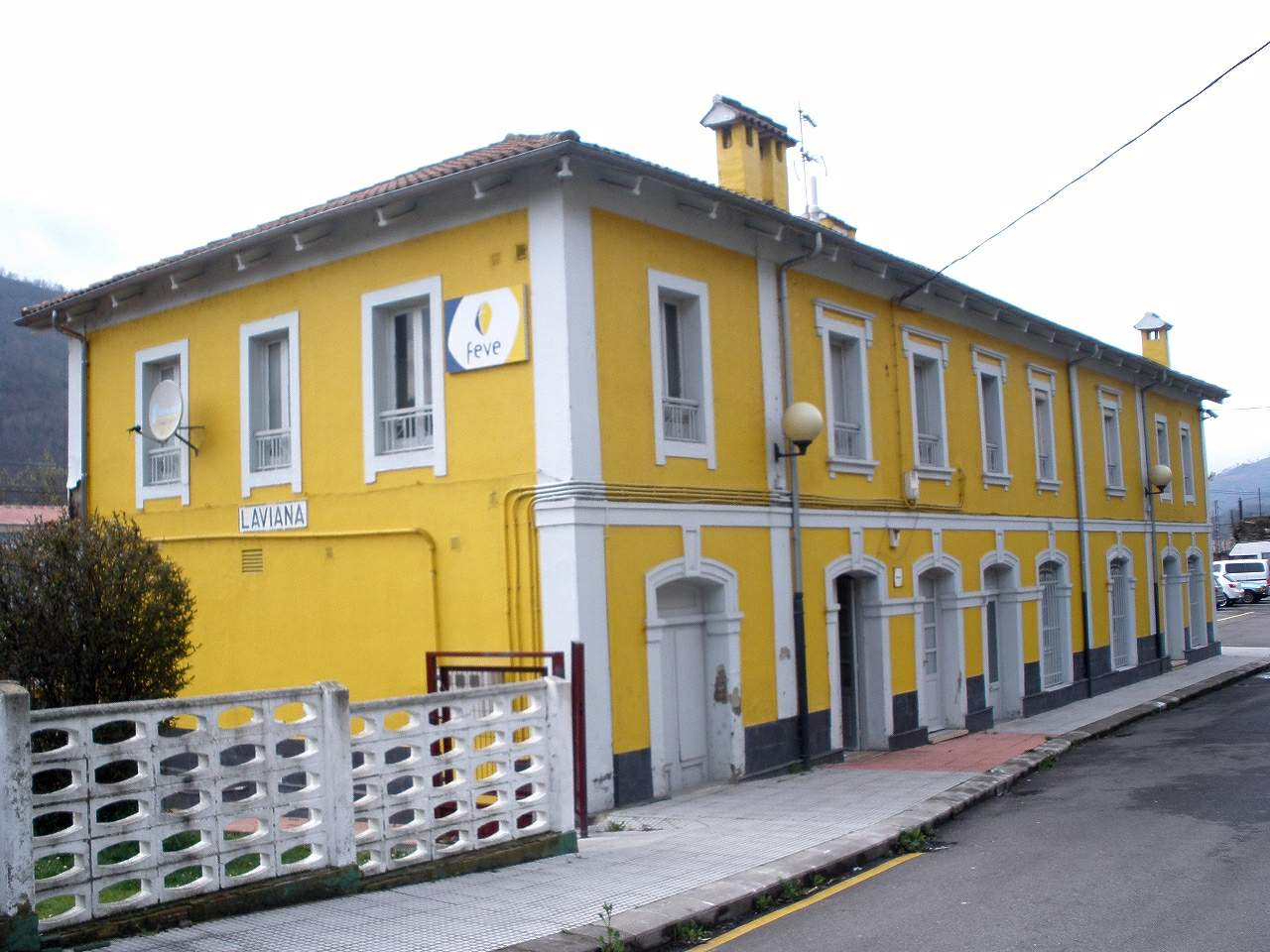 Pola de Laviana (Asturias)